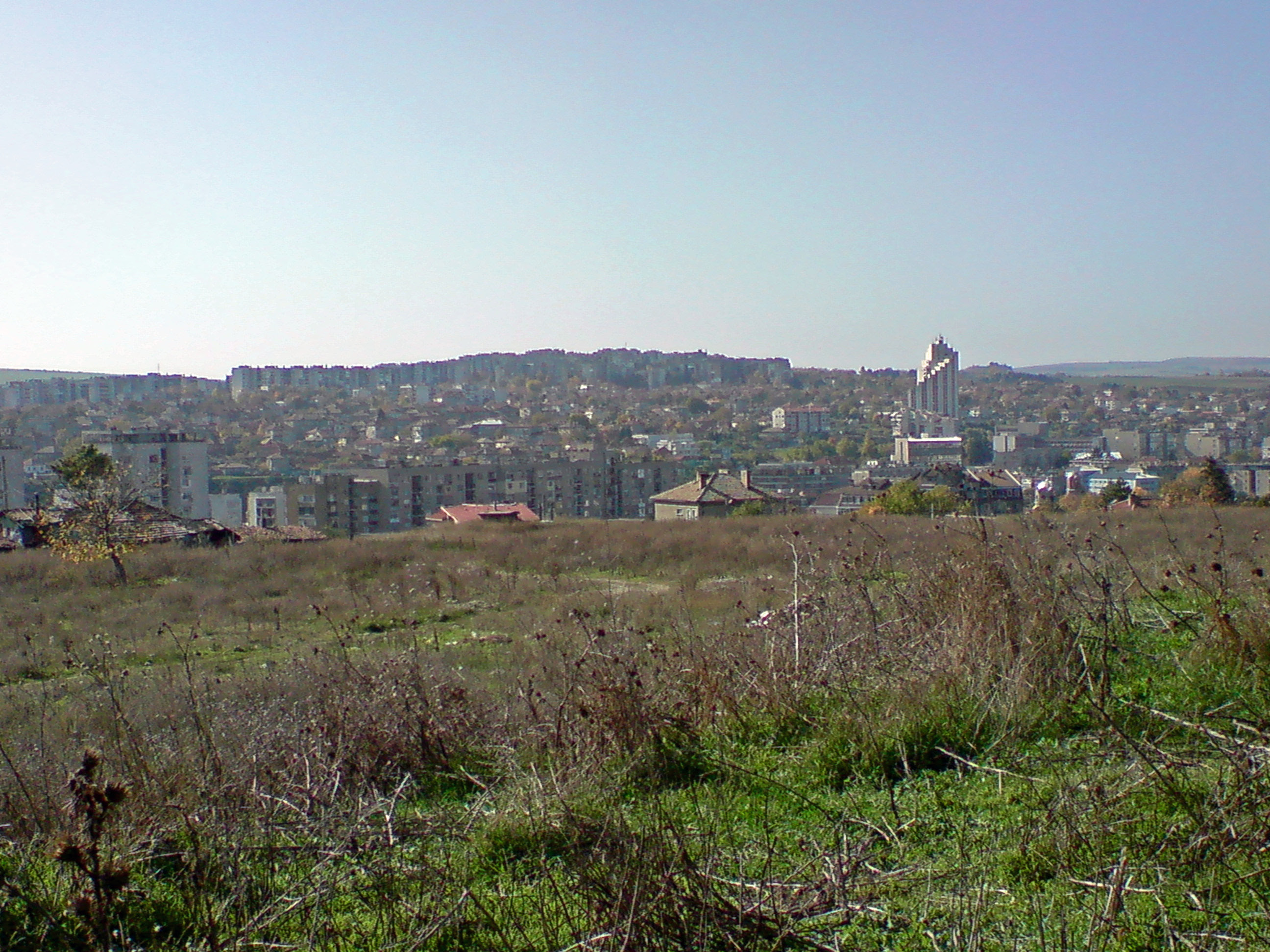 Armenskite lozya, 7200 Razgrad, Bulgaria